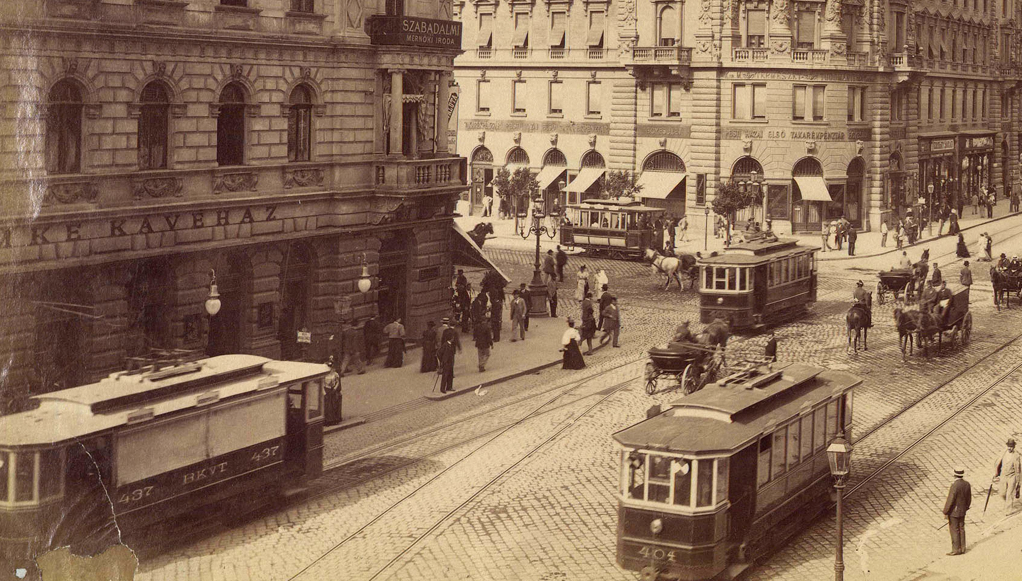 Nagykörút - Rákóczi út kereszteződés a mai Balha Lujza tér felől nézve.